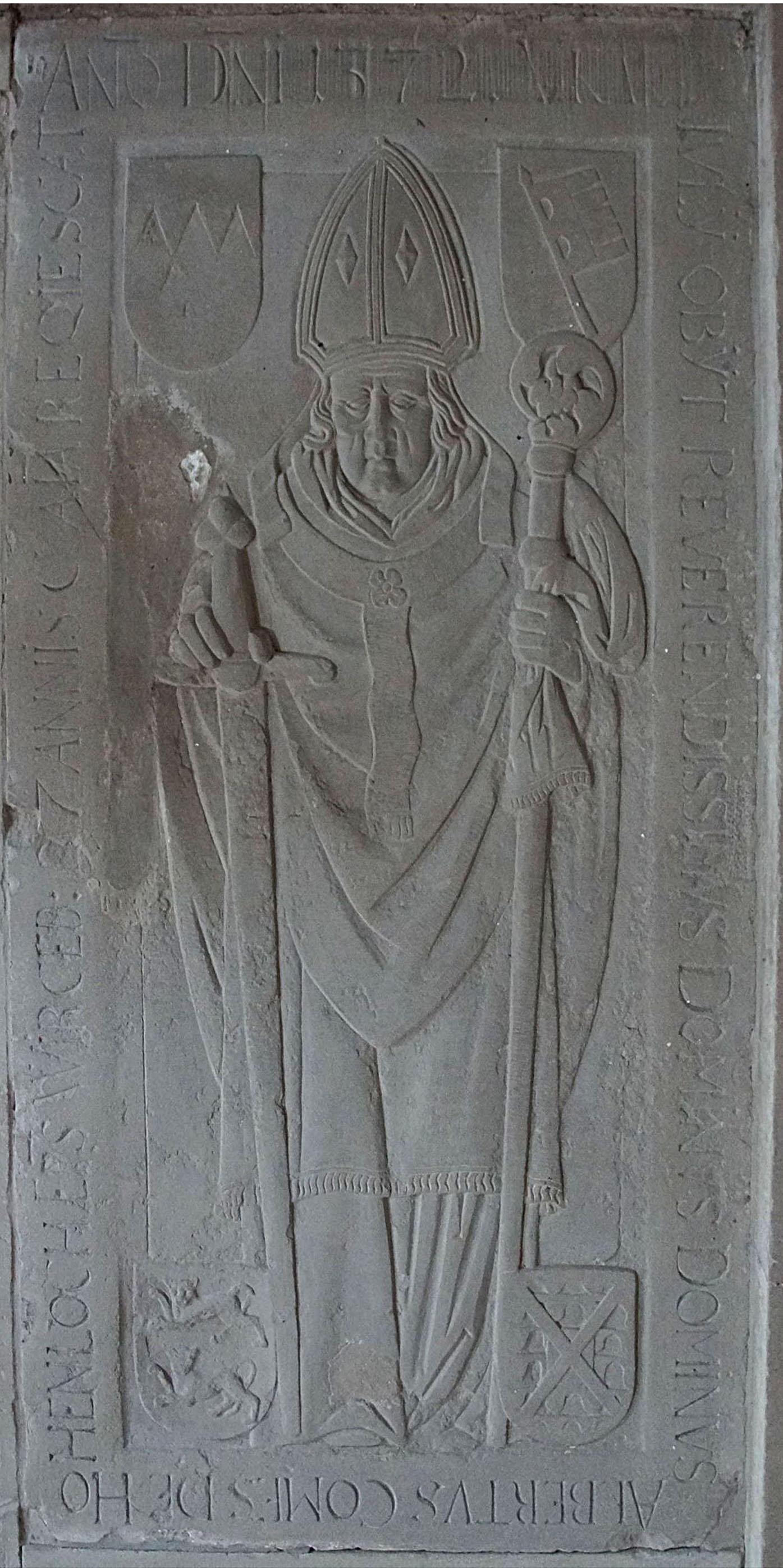 Grablege in der Marienkirche in der Festung Marienburg in Würzburg, Albrecht II. von Hohenlohe